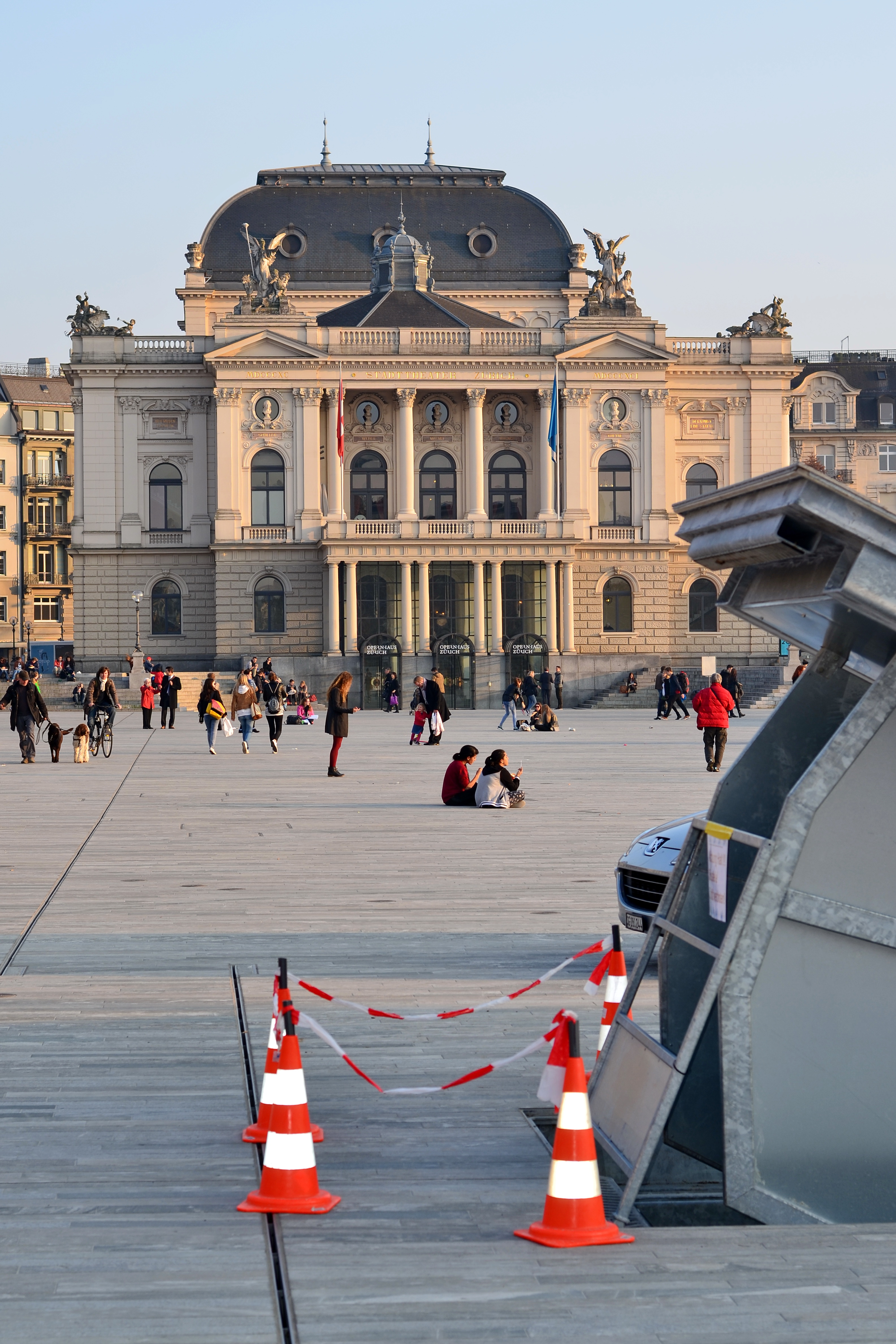 Sechseläutenplatz, Opernhaus in Zürich